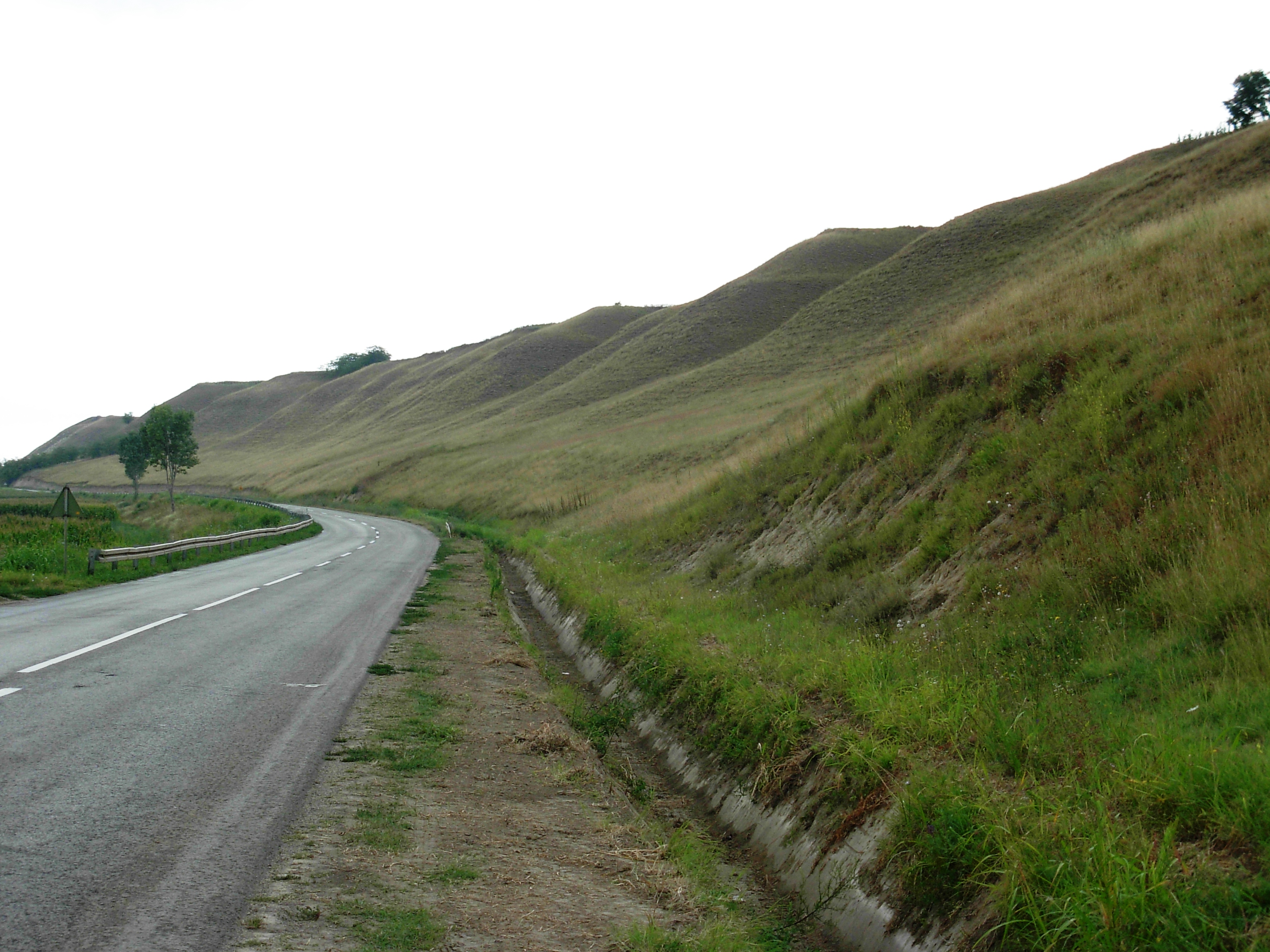 Titelski breg.